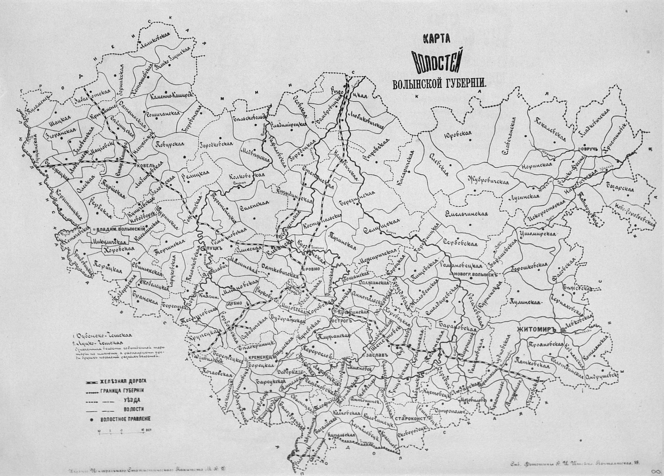 Карта волостей Волынской губернии